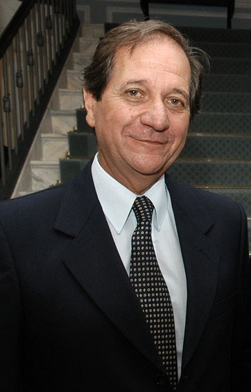 Sergio Abreu